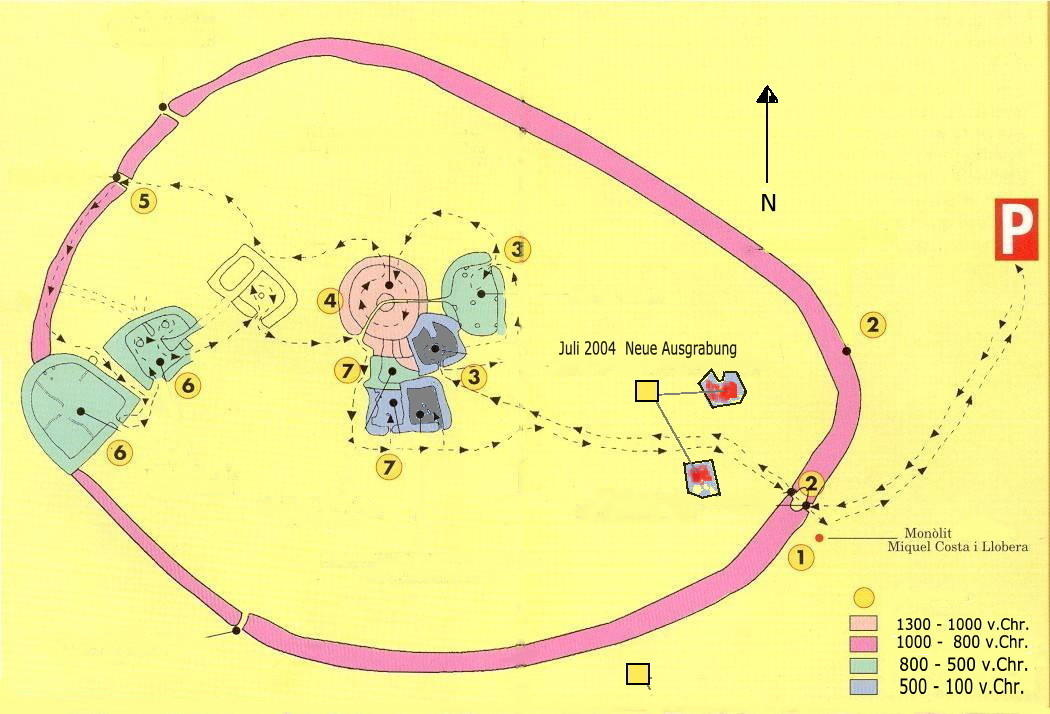 Eigene Skizze (Talayot Ses Païsses) Neu erstellt 21.07.2004 Zeichner: Pedro Servera († 2005)